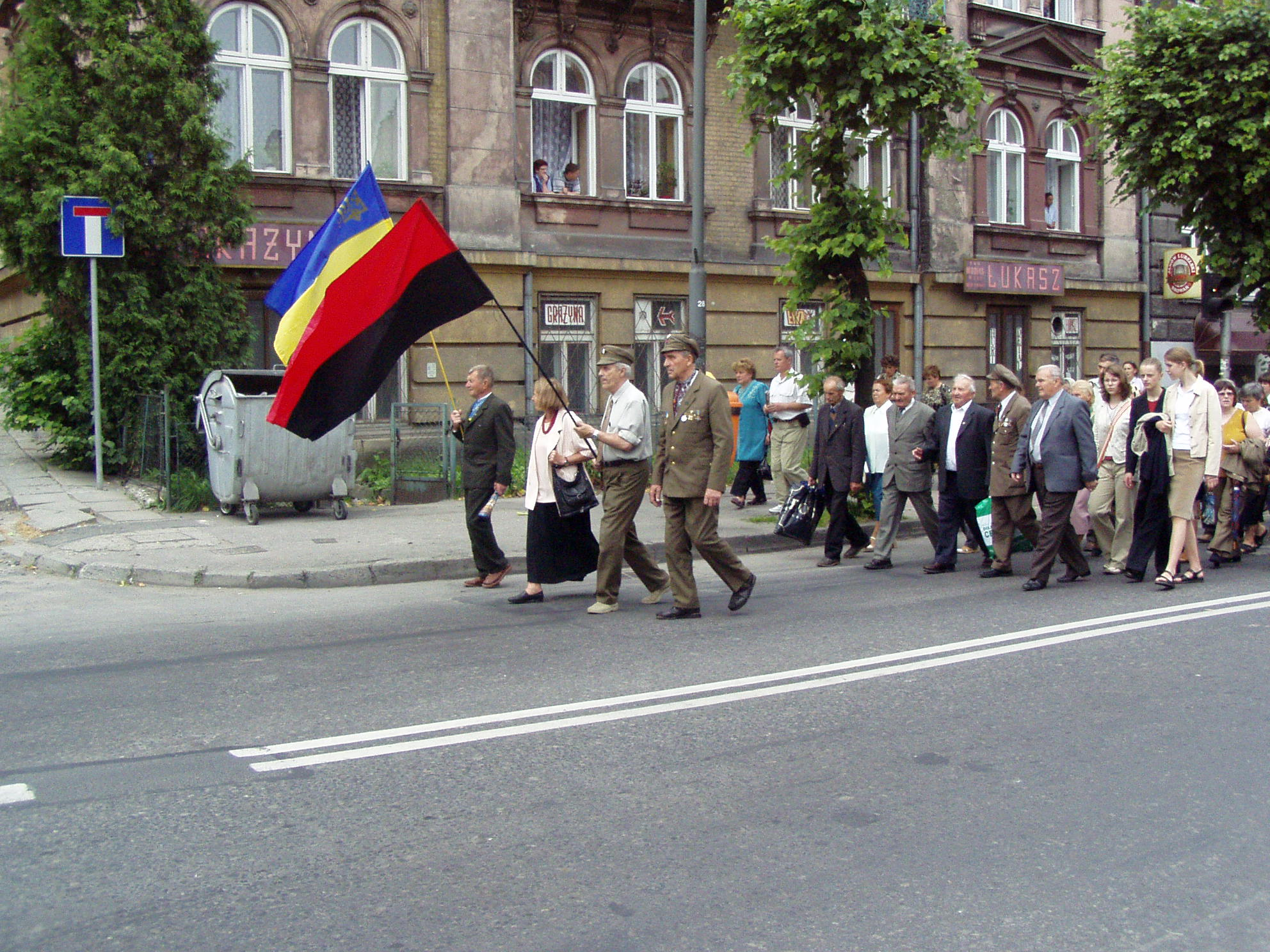 Беларуская (тарашкевіца): Марш вэтэранаў УПА ў Пшэмысьлю.